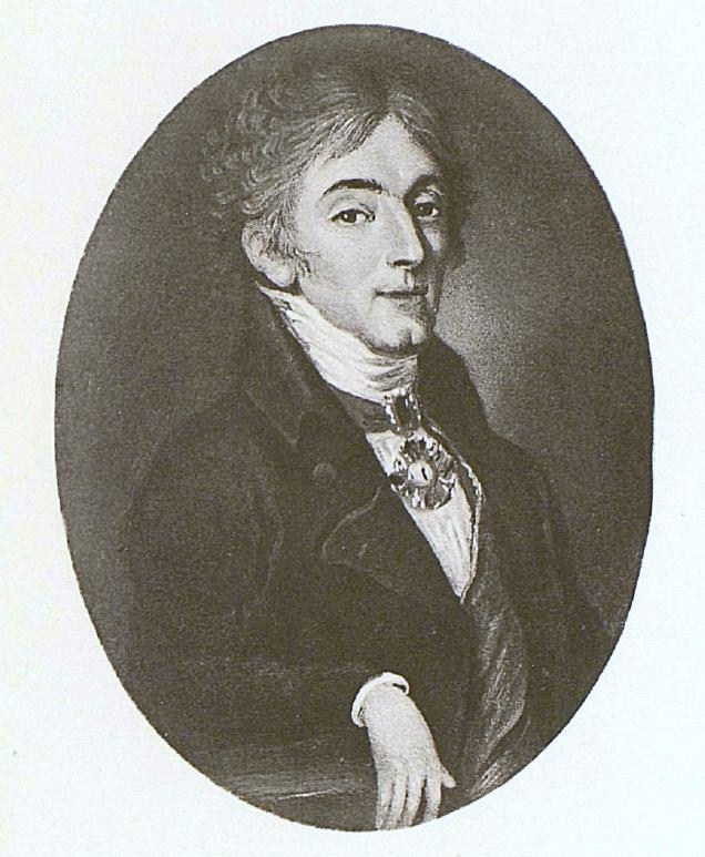 Иван Николаевич Римский-Корсаков